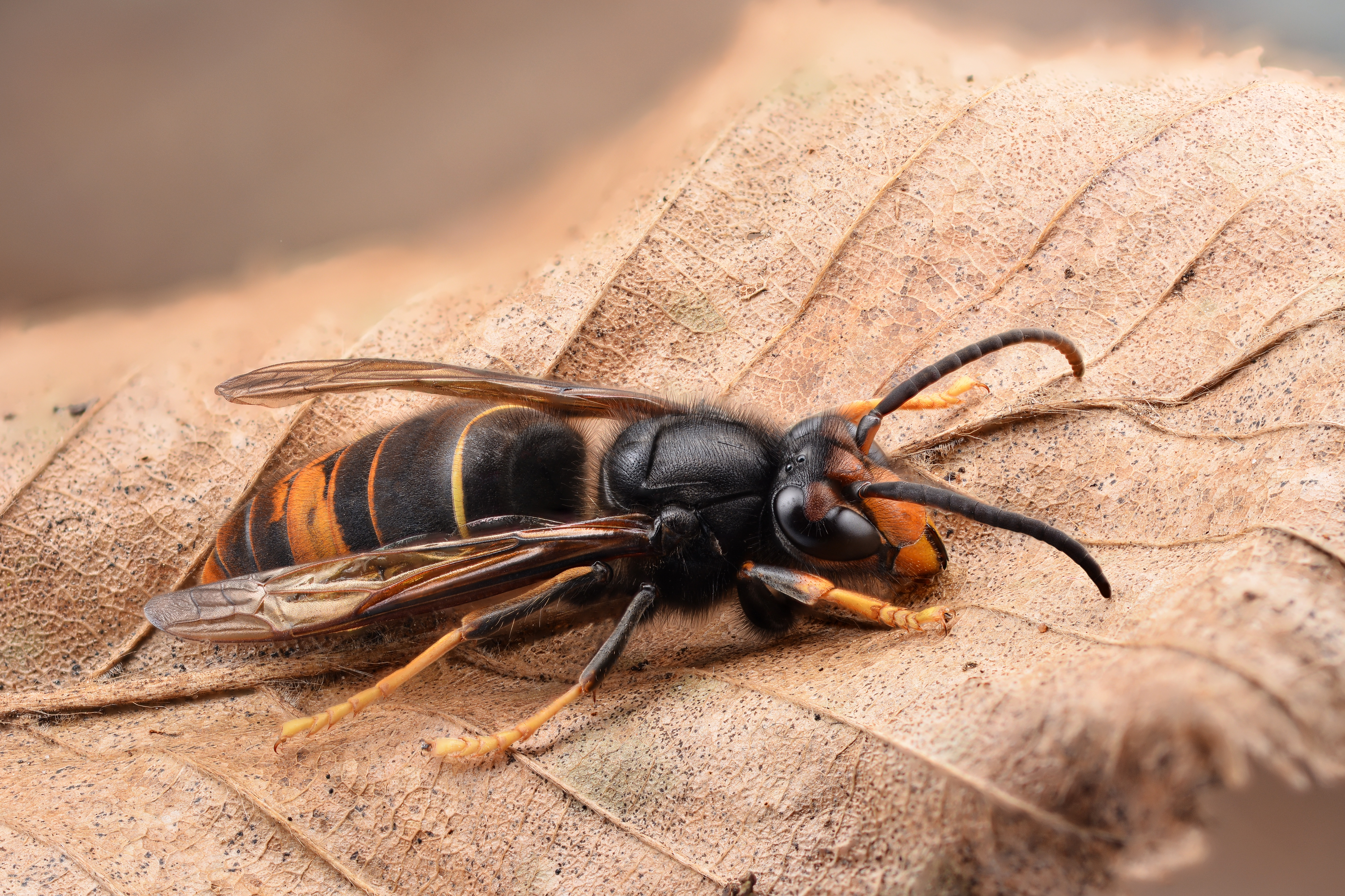 Vespa velutina male (Hymenoptera Vespidae) Location : Guignies - Belgium